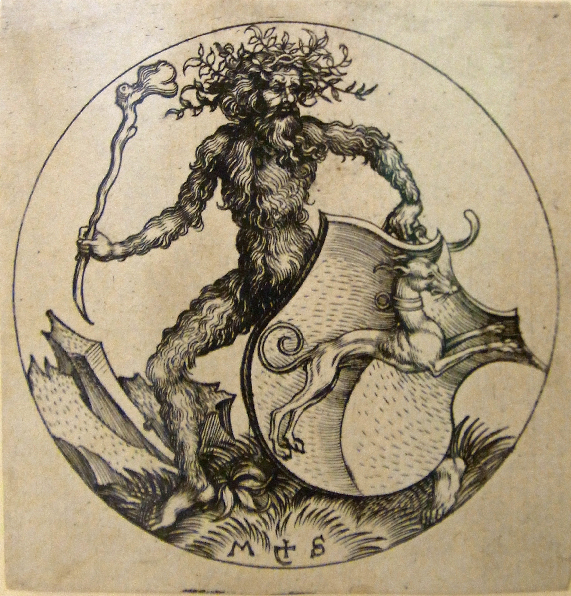 Wilder Mann mit Wappenschild Kupferstich 1480 - 1490 Städel Museum Native nameStädelsches Kunstinstitut und Städtische GalerieLocationFrankfurt am MainCoordinates50° 06′ 11.52″ N, 8° 40′ 25.32″ E Established1816 Web page control : Q163804 VIAF: 168582448 ISNI: 0000 0001 2204 5232 ULAN: 500212565 LCCN: n83038441 GND: 5313082-0 WorldCat institution QS:P195,Q163804